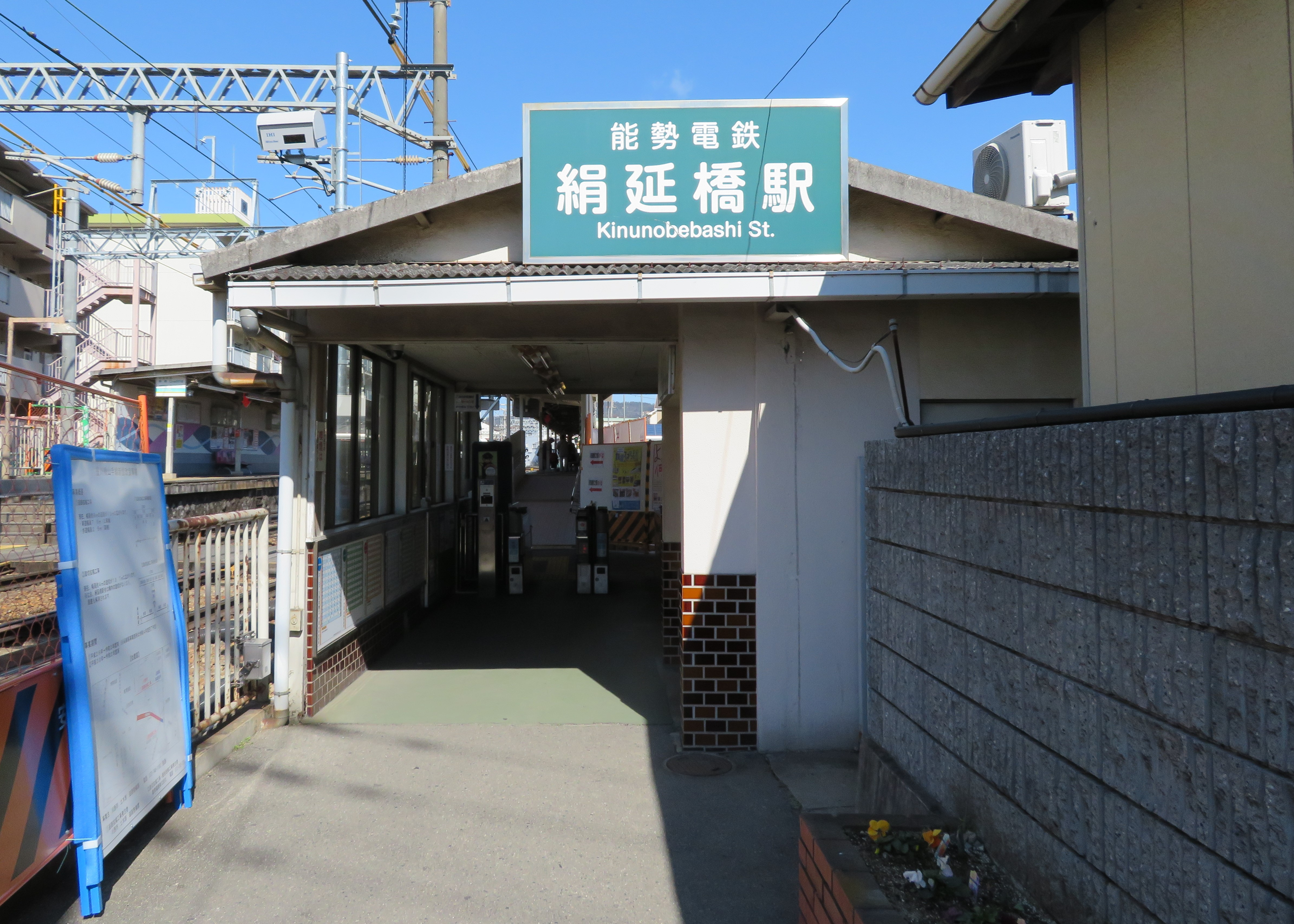 能勢電鉄絹延橋駅